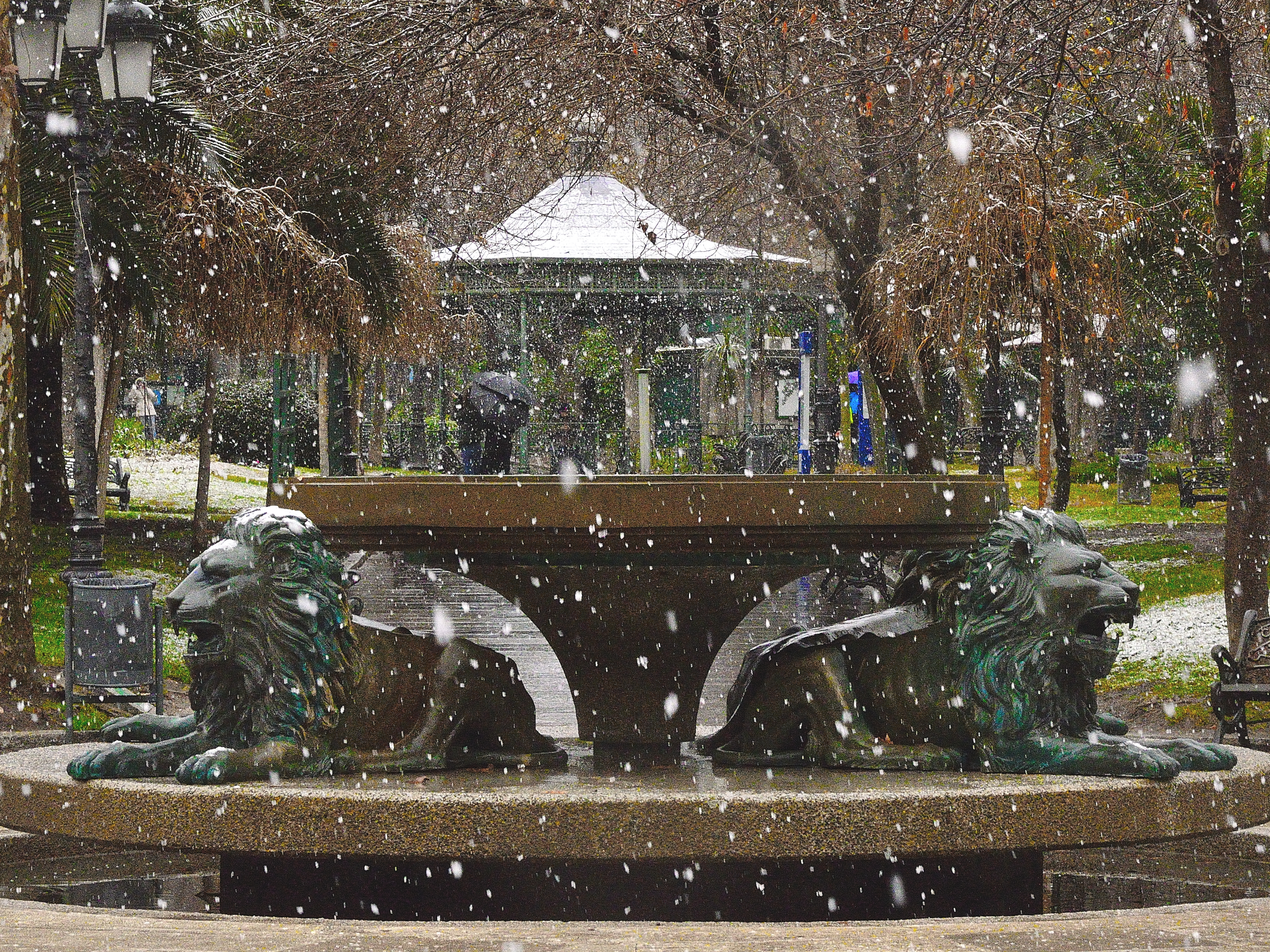 En Puertollano